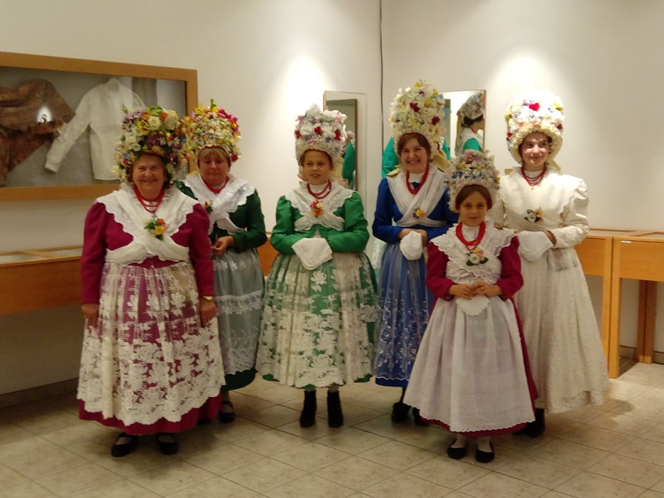 Zdjęcie wykonano w Towarzystwie Bambrów Poznańskich podczas prezentacji stroju bamberskiego